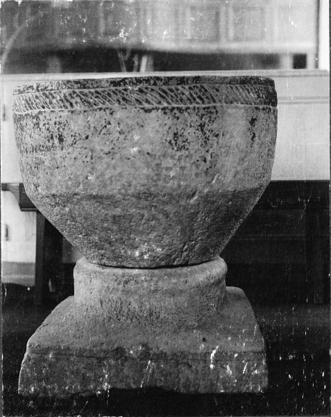 Dopfunt av sandsten. Kategori: (04) DopfuntarDopfunt av sandsten.